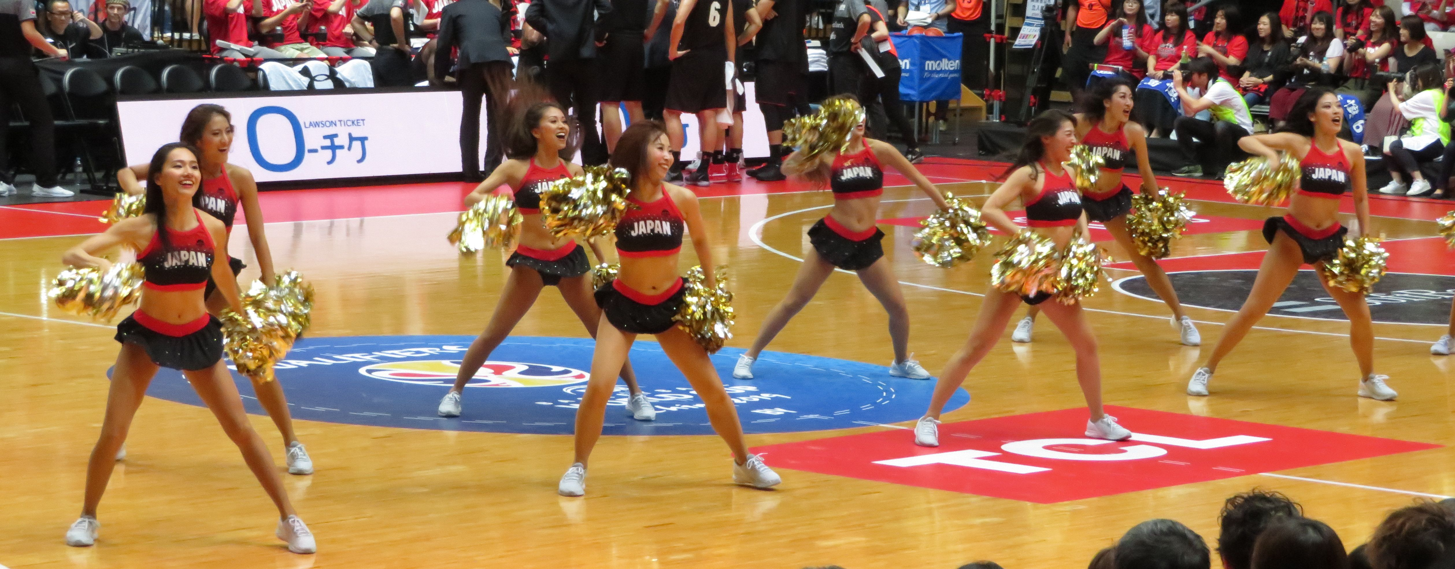 「FIBAバスケットボールワールドカップ2019 アジア地区 2次予選（Window4）」2018年9月18日 日本代表 対 イラン代表 （大田区総合体育館）